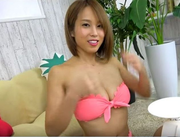 シャベチャン【sherbetchannel】犬童美乃梨